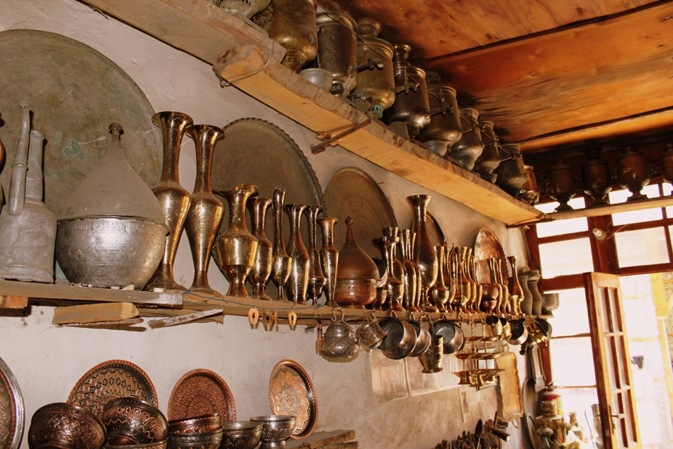 Село Лагич, Исмаиллинского района Азербайджана.